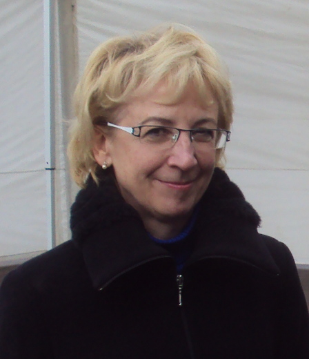 Předvolební meeting ODS v České Lípě, Ing. Eva Bartoňová